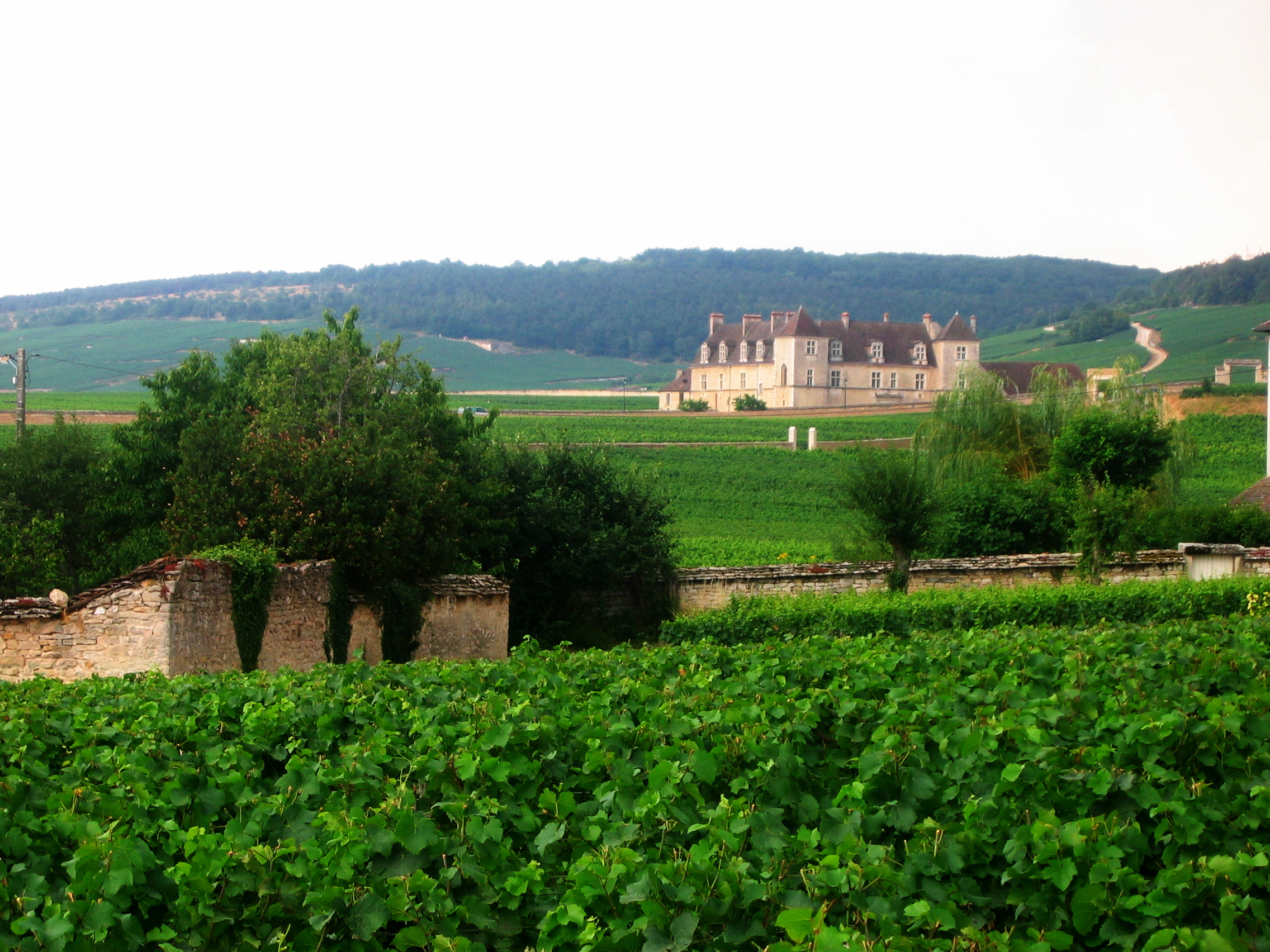 Château Vougeot, Bourgogne, France.